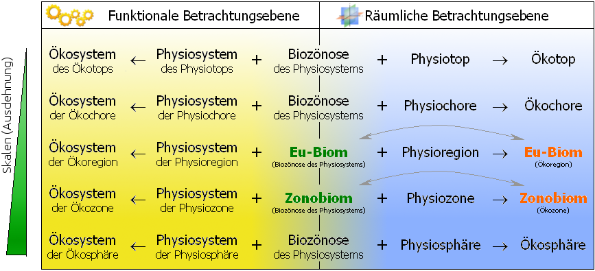 Einordnung der Biome (Eubiome, Zonobiome) in den Aufbau von Ökosystemen in funktionaler und räumlicher Betrachtungsebene. Ökosystemaufbau angelehnt an LESER (1997). Im Unterschied zu LESER wird in der hier vorliegenden Darstellung allerdings berücksichtigt, dass die Biozönose sowohl räumlichen als auch funktionalen Charakter besitzt. Denn Lebewesen befinden sich einerseits an einer bestimmten Stelle im Raum (und bewegen sich darin) und fungieren andererseits gleichzeitig als interagierende Systemeinheiten. LESER andererseits unterteilt den Charakter von Lebewesen künstlich. Für die räumliche Betrachtungsebene sieht er ausschließlich ihre räumliche Komponente. Diese nennt er 'Biotop' (Phytotop und Zootop) und meint damit ihren Aufenthaltsort (Wuchsort, Fundort) im Raum. Für die funktionale Betrachtungsebene sieht er ausschließlich ihre funktionale Komponente. Diese nennt er 'Biosystem' (Phytozönose und Zoozonose) und meint damit ihre Wechselwirkungen untereinander. Eubiome, Zonobiome in Grün: Klassischer biotischer Biom-Begriff. Eubiome, Zonobiome in Orange: Neuerer ökologischer Biom-Begriff. Klassischer biotischer Biom-Begriff nach CLEMENTS (1939). Neuer ökologisierter Biom-Begriff – sowie die Begriffe Eubiom und Zonobiom – nach WALTER und BRECKLE (1991). Clements FE: Chaper 2. In: Clements FE, Shelford VE: Bio-Ecology. New York, 1939 Leser H: Landschaftsökologie. Stuttgart, 1997: 163-165 ISBN 3-8252-0521-5 Walter H, Breckle S-W: Ökologie der Erde, Band 1 · Grundlagen. Stuttgart, 1991: 27 ISBN 3-437-20454-8